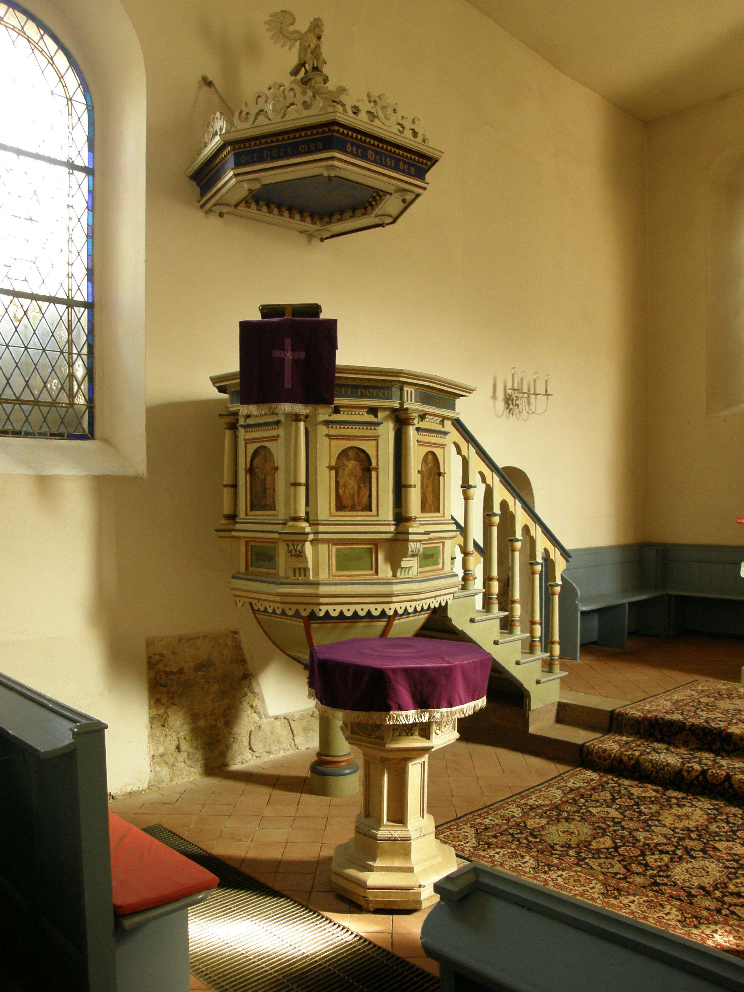 Berlin-Mahlsdorf, Hönower Str., alte Pfarrkirche, innen; Kanzel